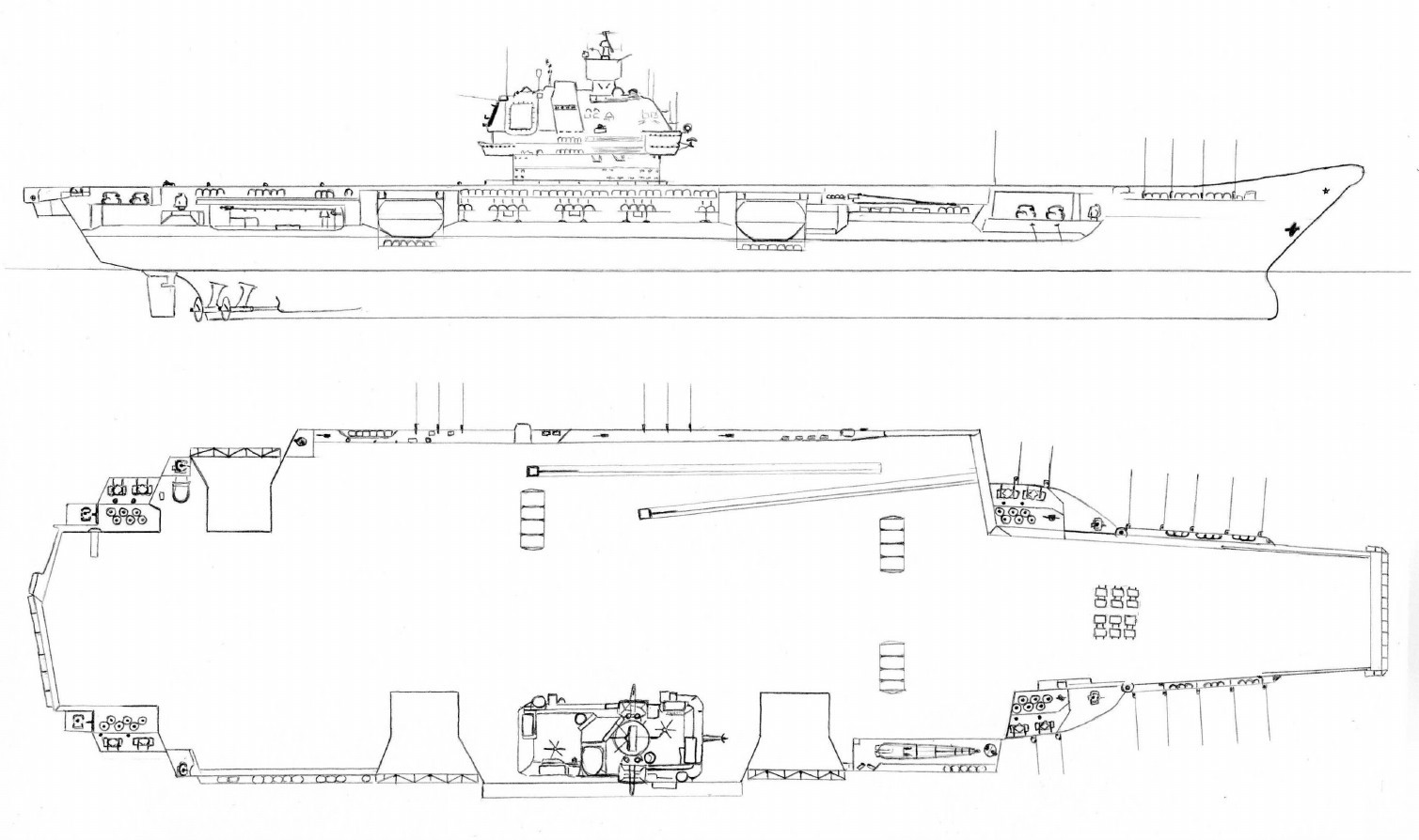 Схема тяжелого атомного авианесущего крейсера "Ульяновск"